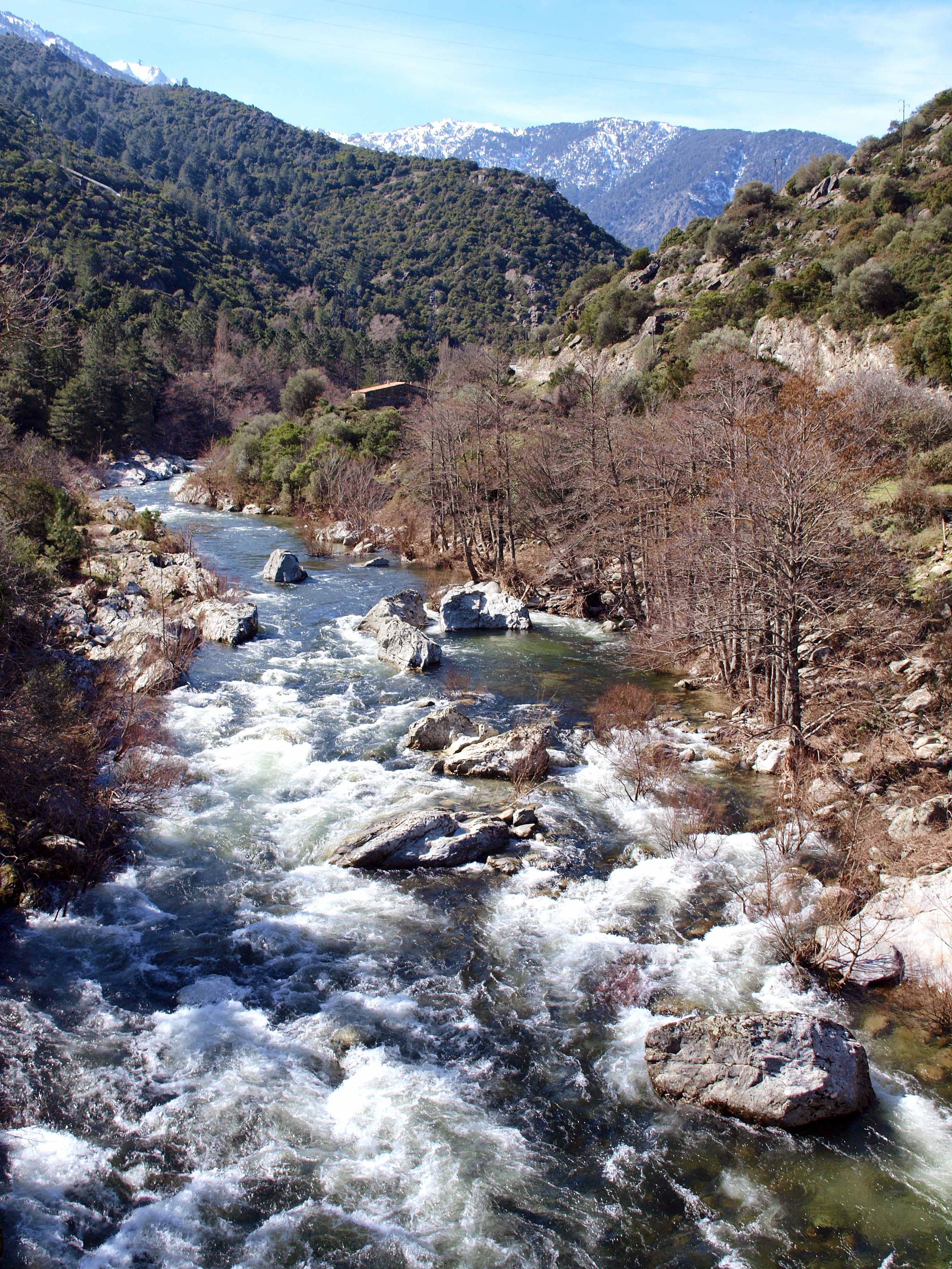 Castirla, Talcini (Haute-Corse) - Le Golo en amont du pont du Diable, pont génois du XVe siècle à Ponte Castirla